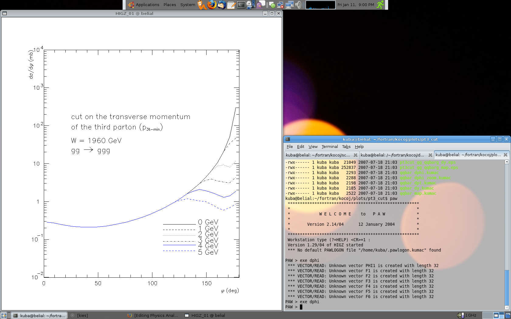 PAW example